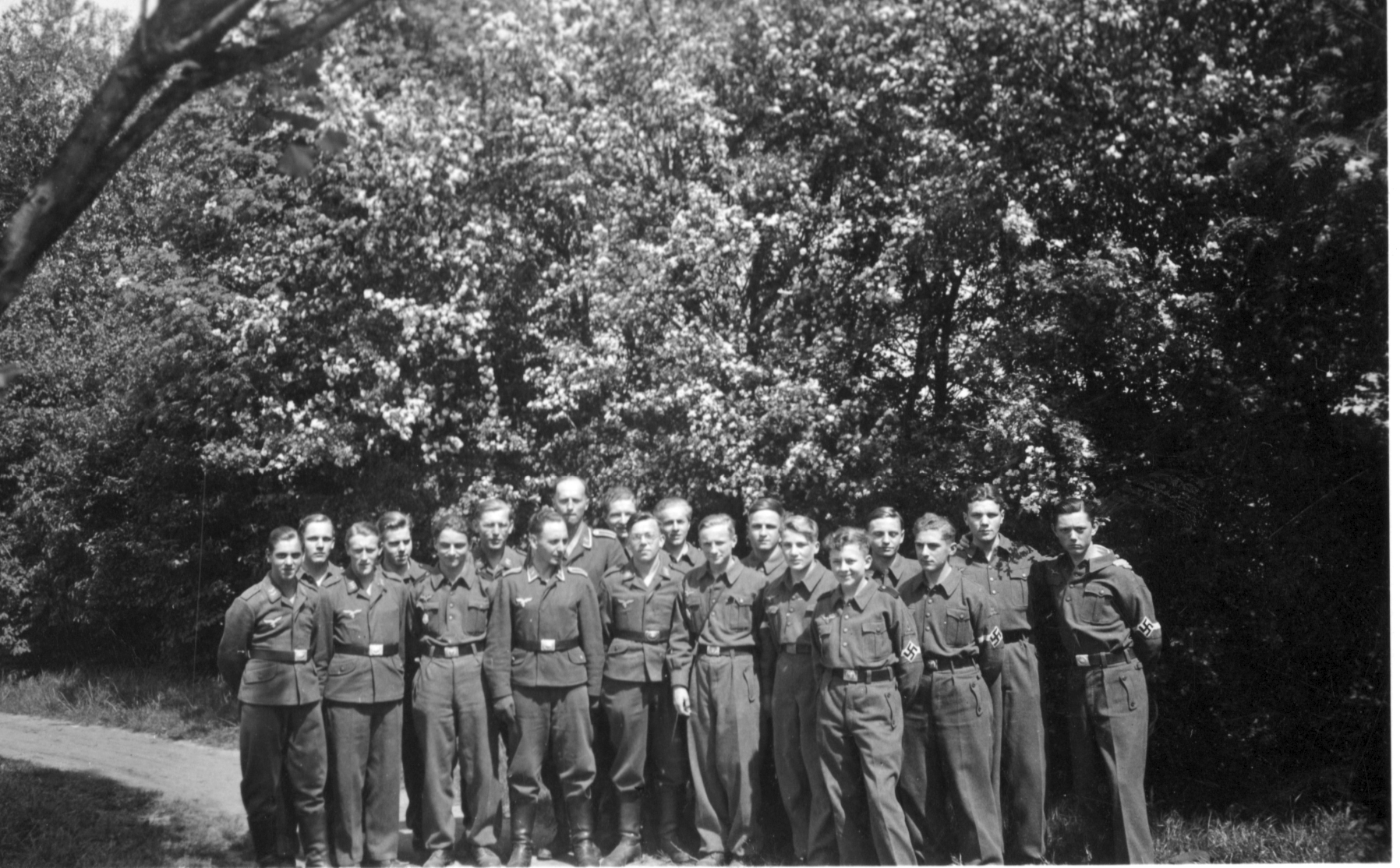 Die Flakhelfer Mannschaft der 10,5 cm Flak-Batterie Schwanheim bei Frankfurt, ehemals Klasse 7 des Goethe-Gymnasiums Frankfurt (eingezogen im Februar 1943)